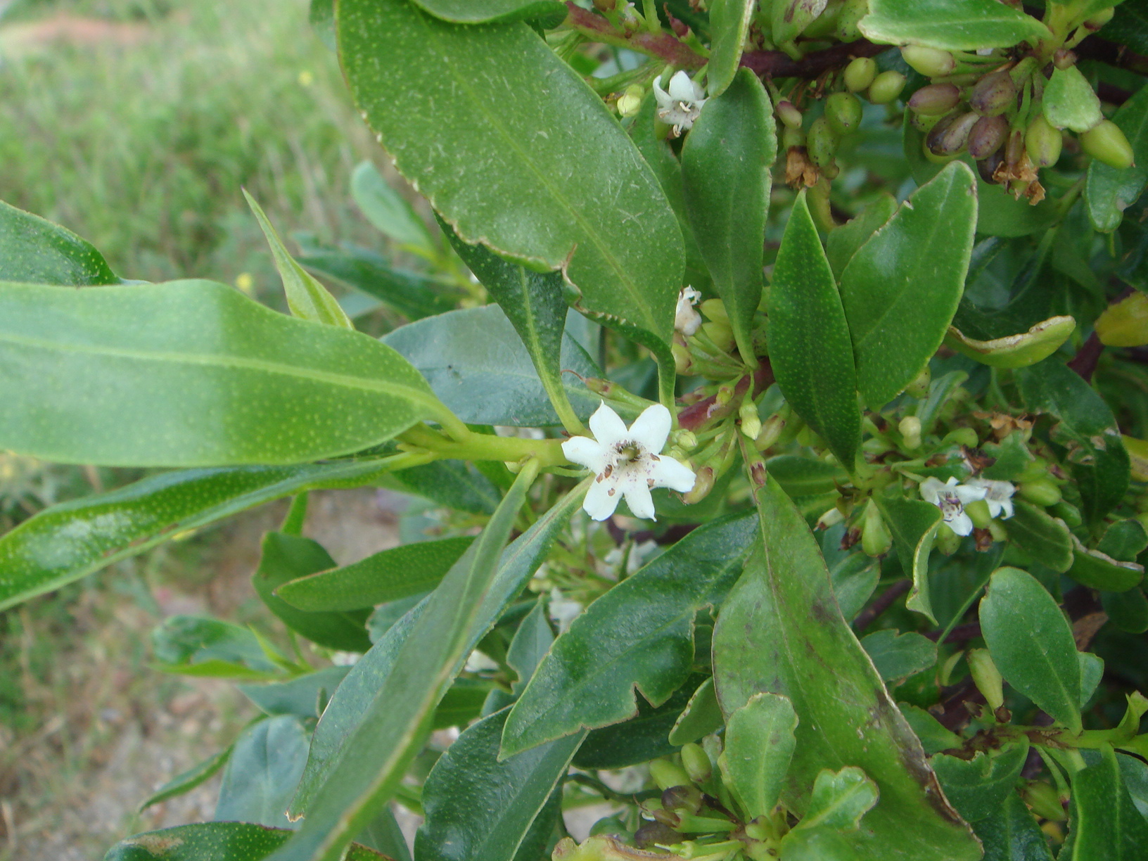 Mioporo (Myoporum laetum), Ceuta, España.